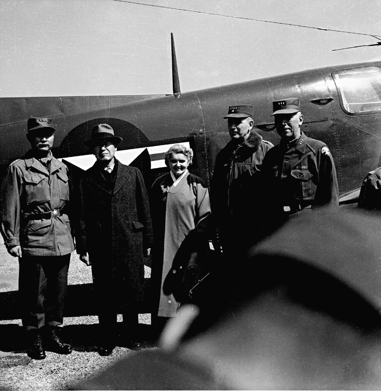 촬영일 : 1954년 03월 20일 촬영장소 : 대한민국 강원도 양구 참석자 : 이승만 대통령 내외, 군인들 인물상세정보 : 이승만 대통령(좌2) , 프란체스카 여사(좌3) 관련내용 : 이승만 대통령 내외가 강원도 양구의 일선부대에서 열린 국군 야전사령관 작전지휘권 이양식에 참석했다.